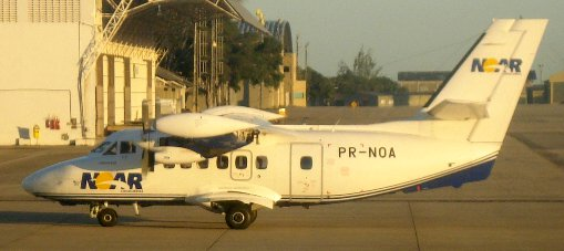 Самолёт Let L-410UVP-E20 на стоянке. Бразилия, 20 марта 2011 г.